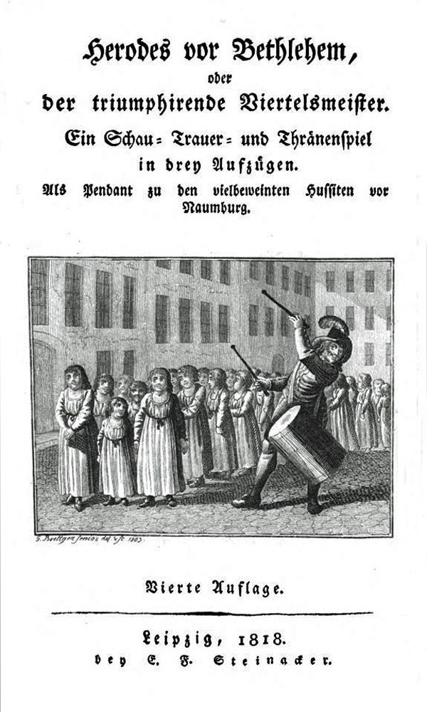 Titelblatt zu "Herodes vor Bethlehem" von Siegfried Gustav Mahlmann